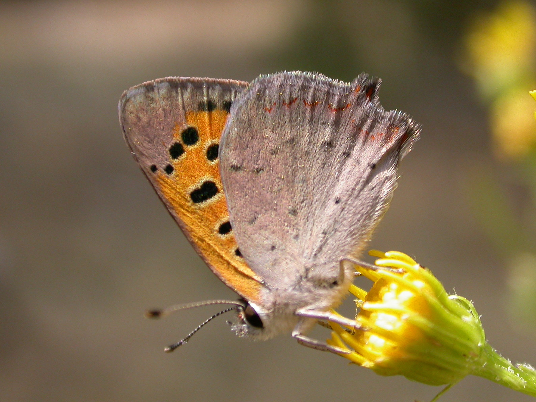 Lycaena phlaeas (Lycaenidae). Revenga, Segovia, España.